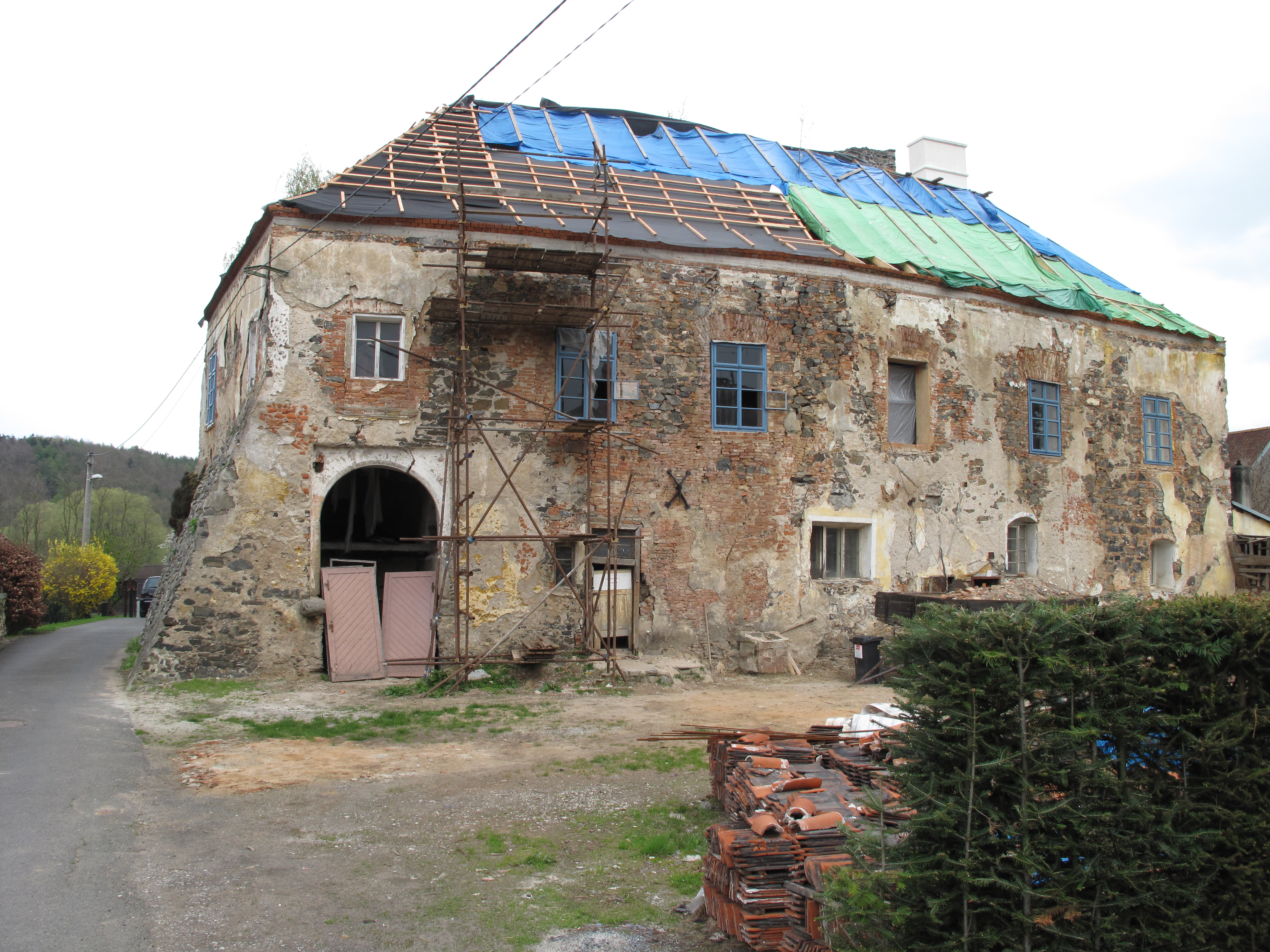 Dolany (okres Klatovy). Okres Klatovy, Česká republika.